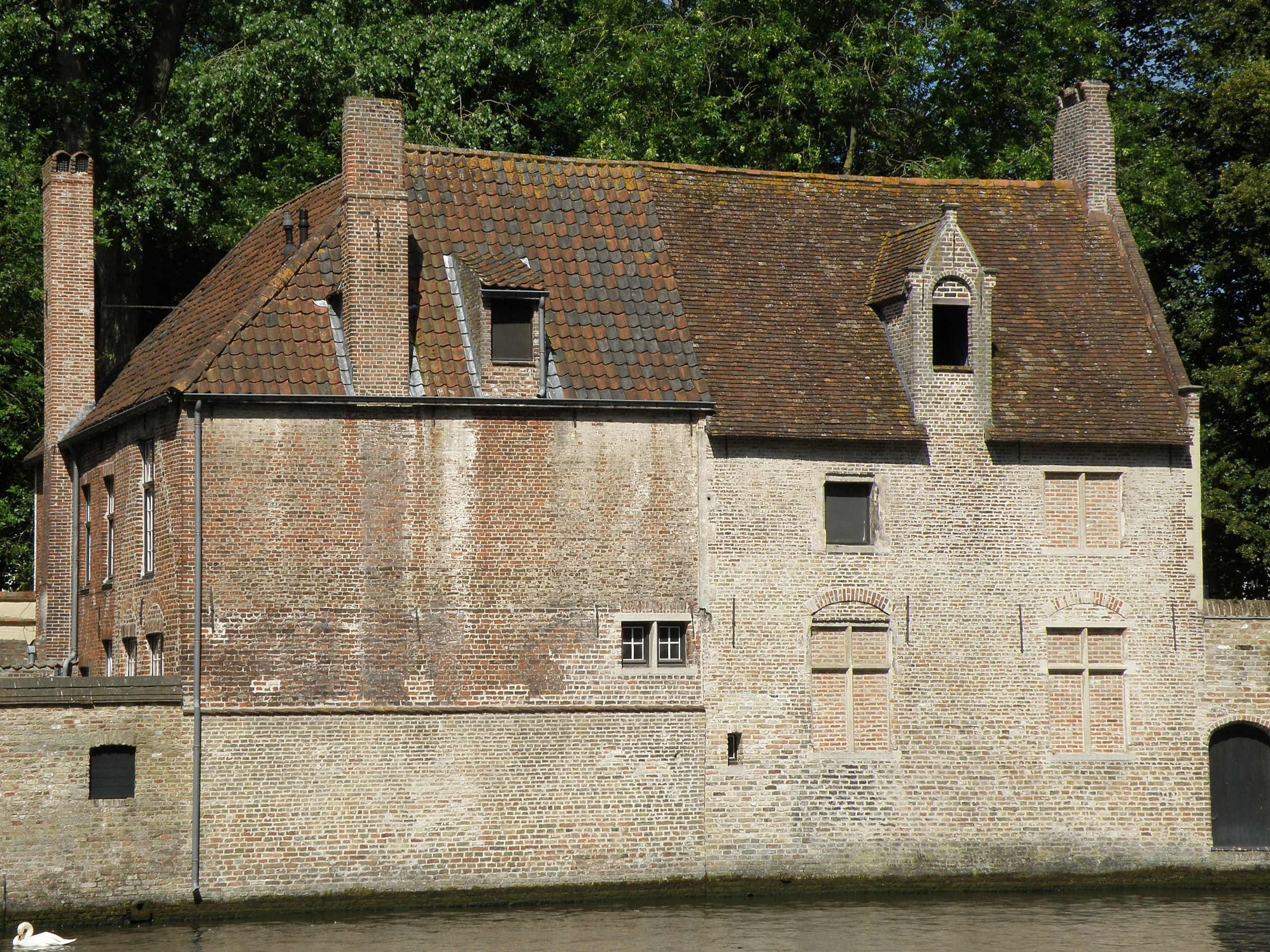 Begijnenhuis 3, Bruges